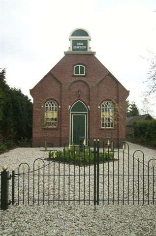 Kerkje te Drouwenerveen Categorie:Borger-Odoorn